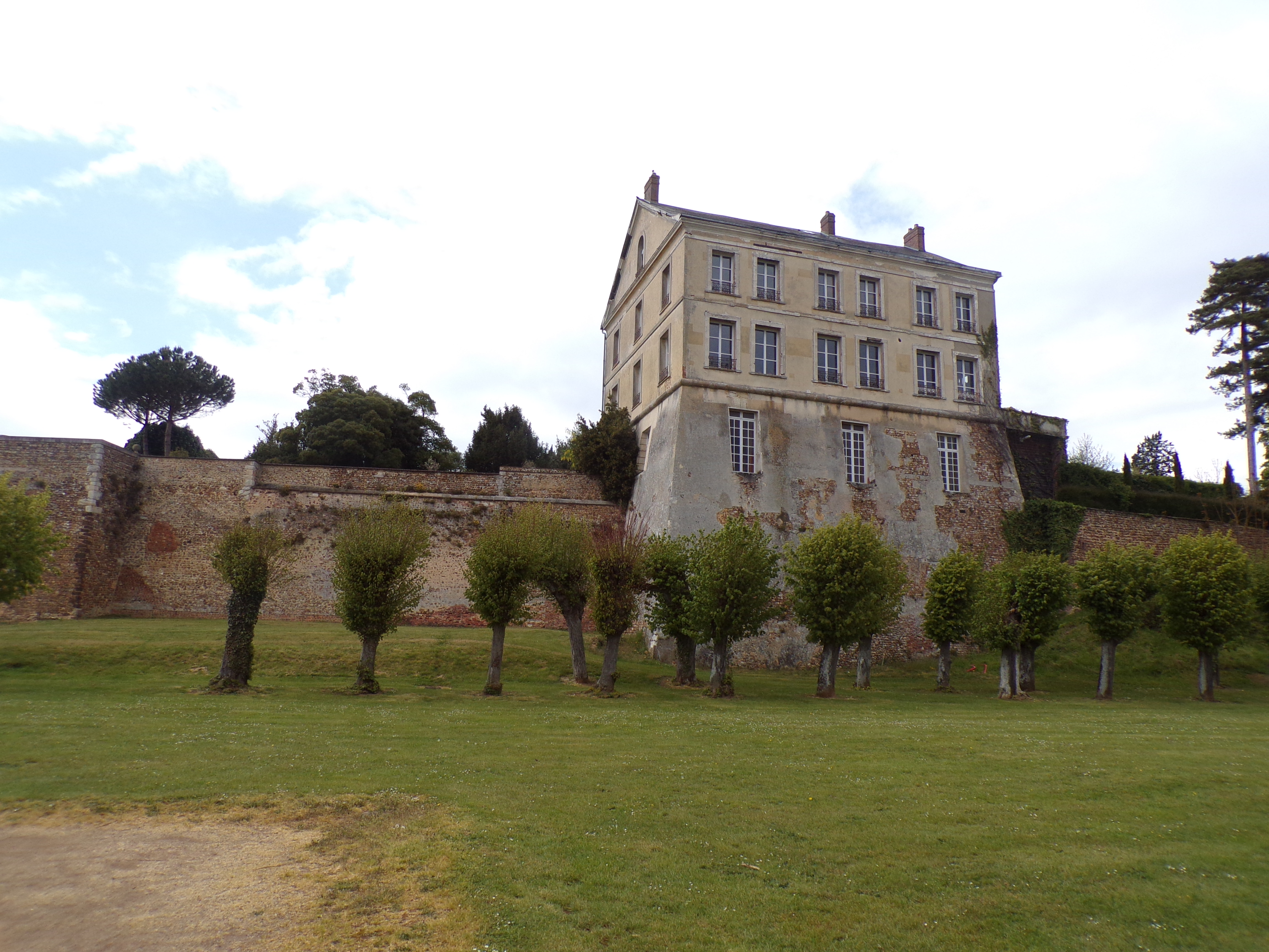 Vu du château à partir du parterre